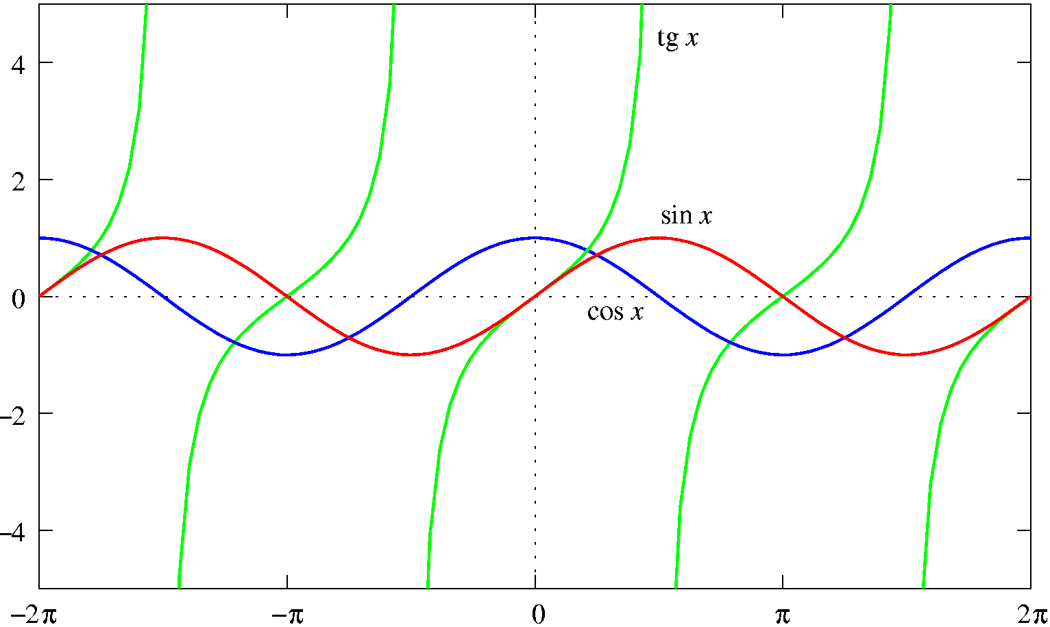 Grafi trigonometričnih funkcij.